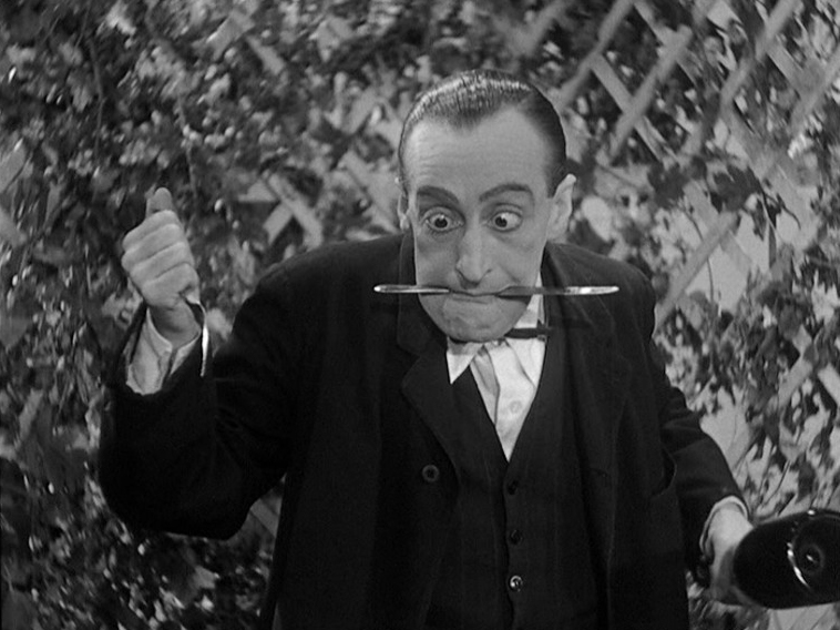 Screenshot del film "Fermo con le mani !" di Gero Zambuto, 1937